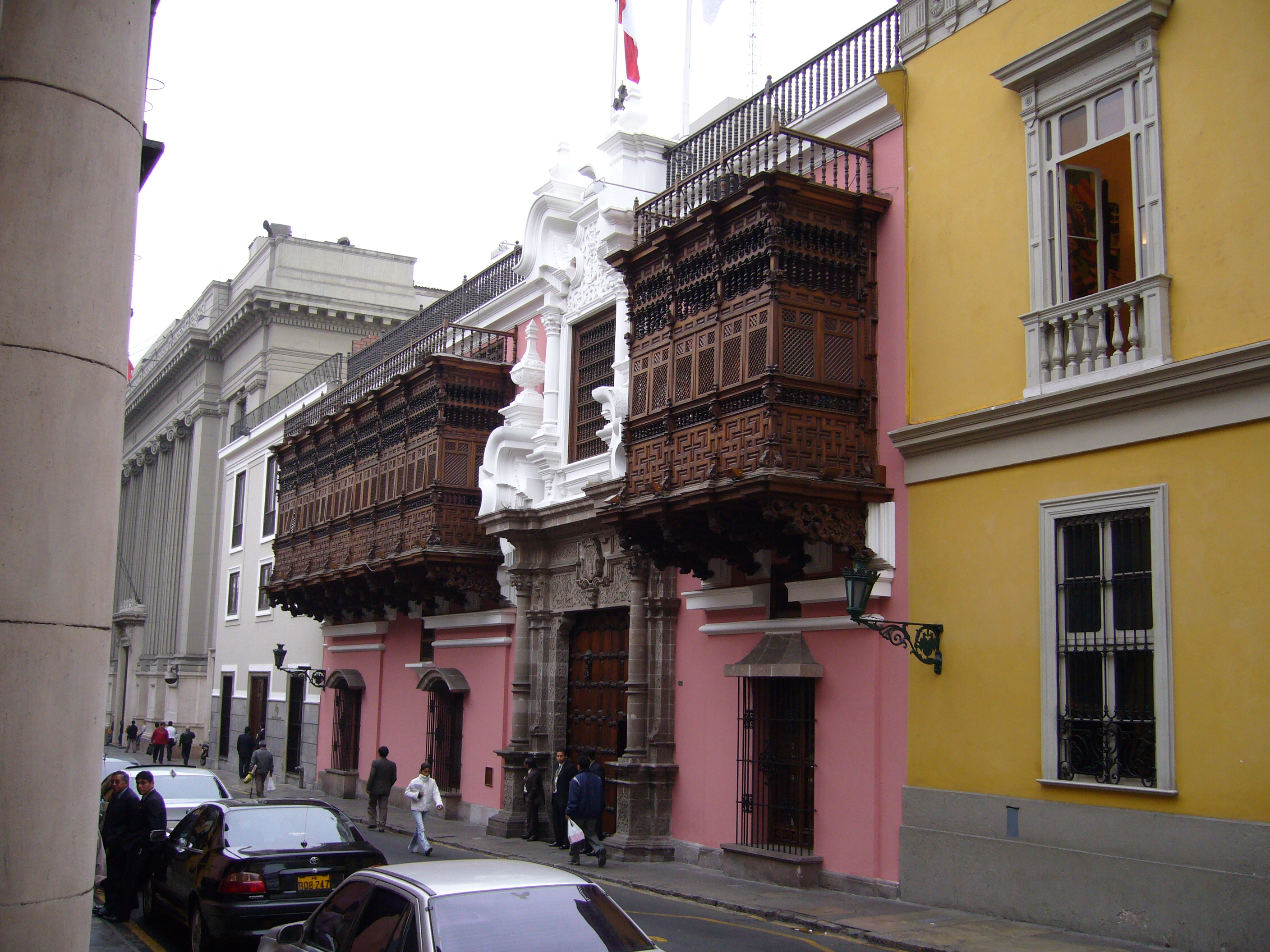 Descripción: Palacio de Torre Tagle Lugar: Centro Histórico de Lima Distrito : Cercado de Lima Ciudad : Lima País : Perú Fotógrafo: © Manuel González Olaechea y Franco Fecha de la foto : 11 de julio de 2007